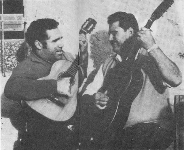 Fotografía del payador uruguayo Juan Carlos Bares "el indio" (izquierda) junto a Jorge Alberto Socodato (derecha), aparecida en la revista argentina "Rincón del Payador" nº4, en setiembre de 1980.